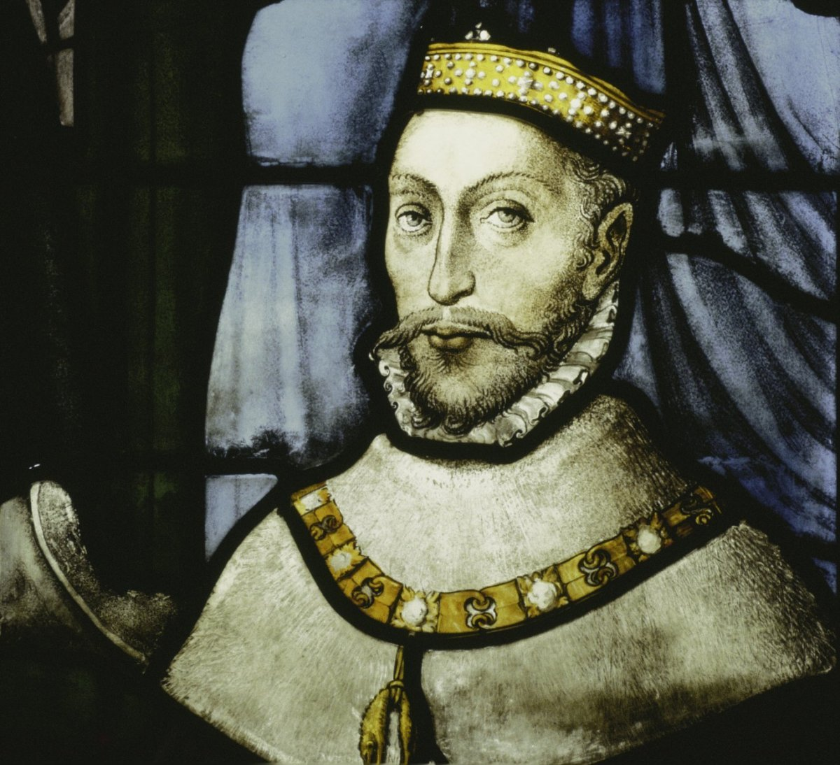 Sint Janskerk: interieur, glas in loodraam NR. 24, detail E 5. De afgebeelde persoon is graaf Philippe de Ligne (1533-1583) ook geschreven Filips van Ligne, heer van Wassenaar en burggraaf van Leiden.